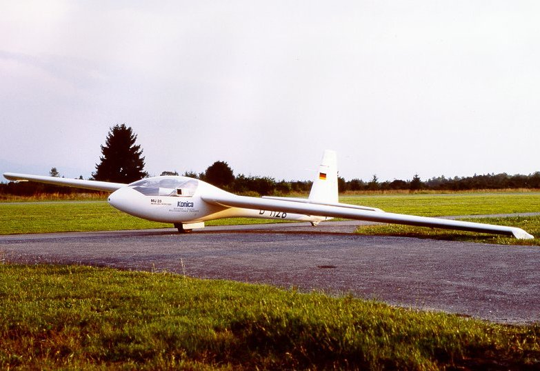 Die Akaflieg München Mü 28, ein Segelfkunstflugzeug der studentischen Fliegergruppe Akaflieg München